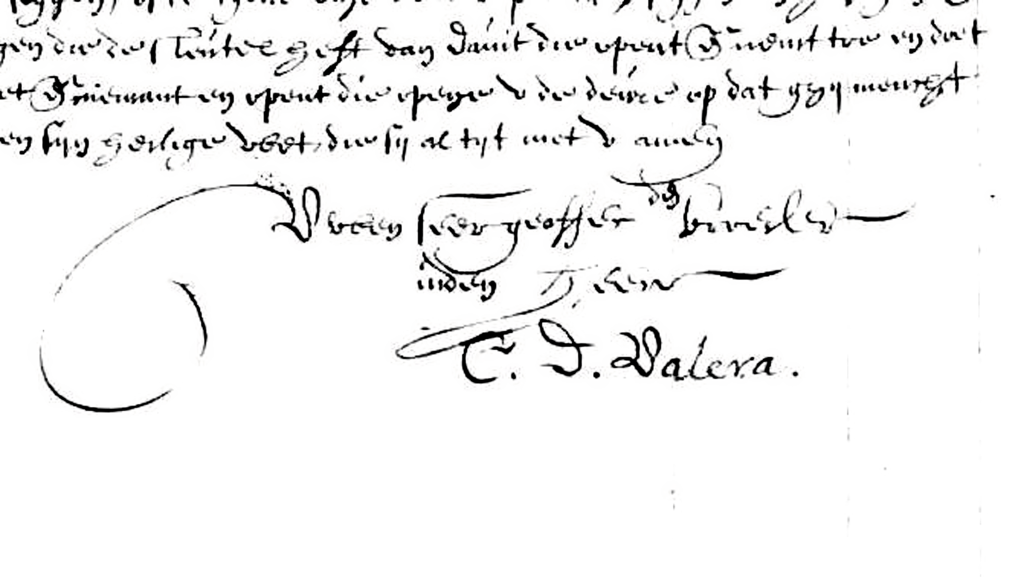 Firma de Cipriano de Valera que aparece en un manuscrito conservado y digitalizado en/por la Biblioteca Nacional de España. Fondo eliminado e imagen mejorada con Photoshop.